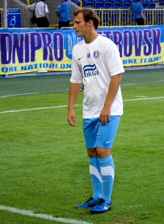 На матче Днепр - Волынь 2011.